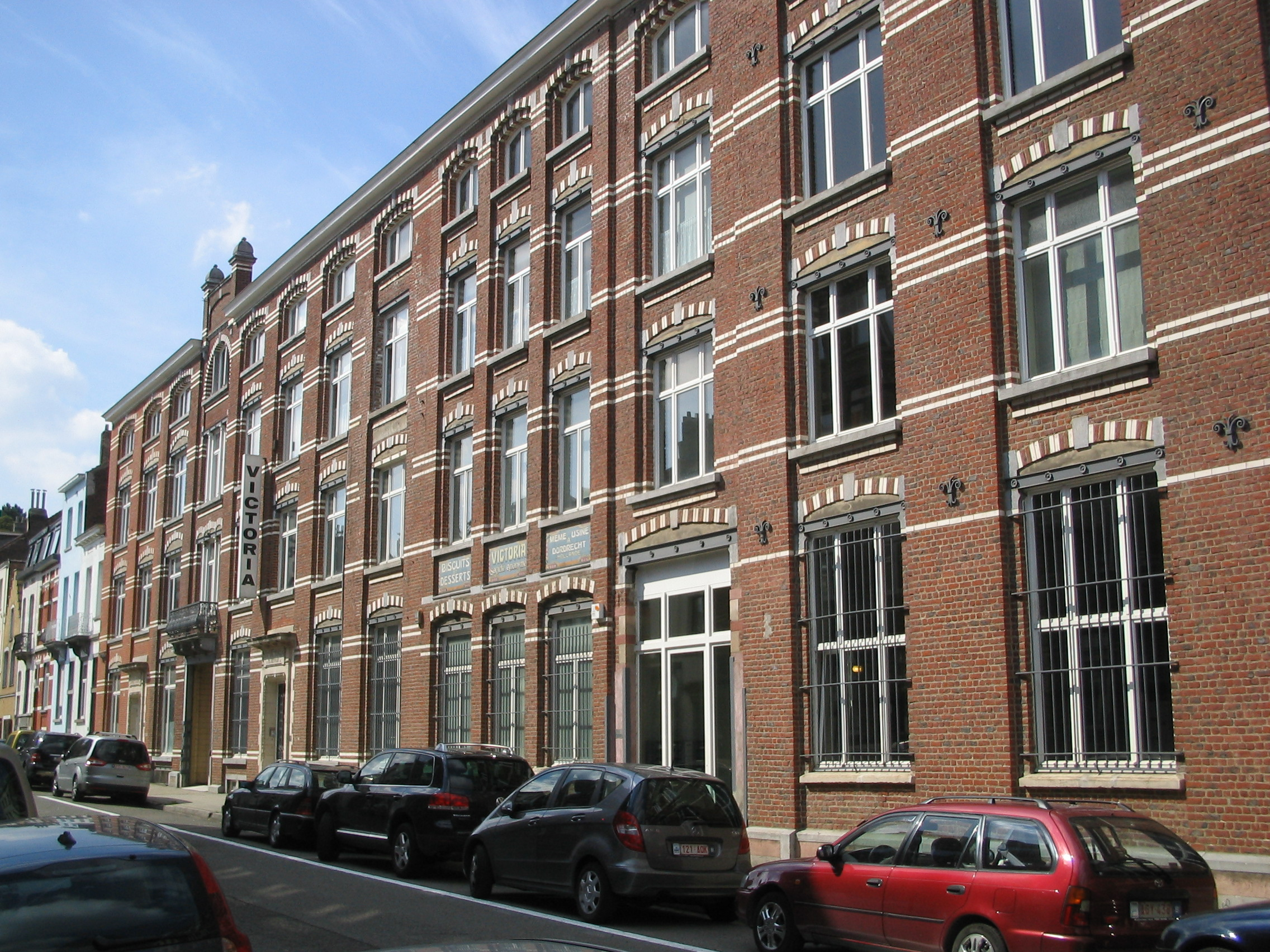 Ancienne usine Victoria. Rue De Neck. Koekelberg.